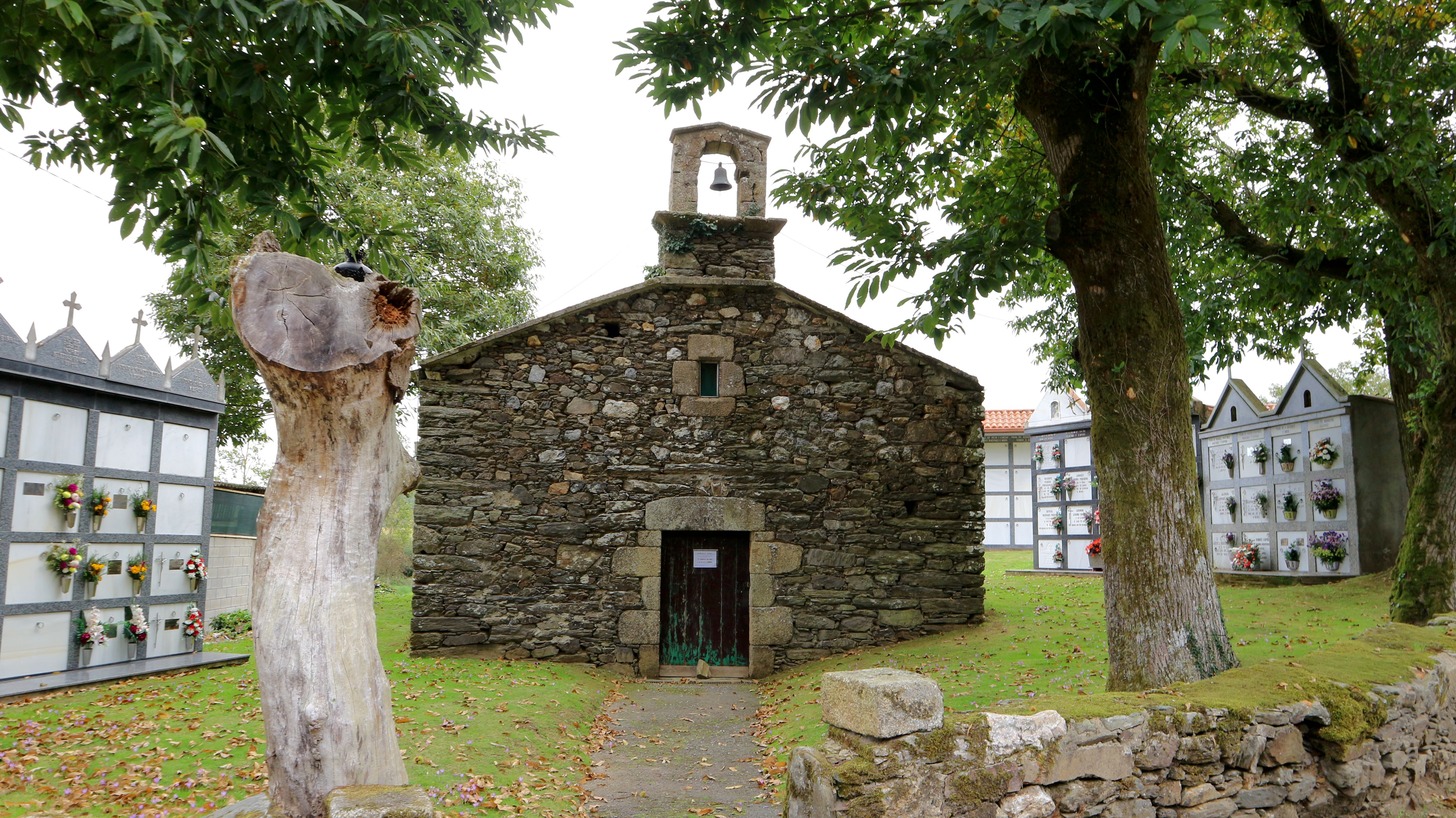 Igrexa de San Lourenzo de Bruma, Mesía (A Coruña).